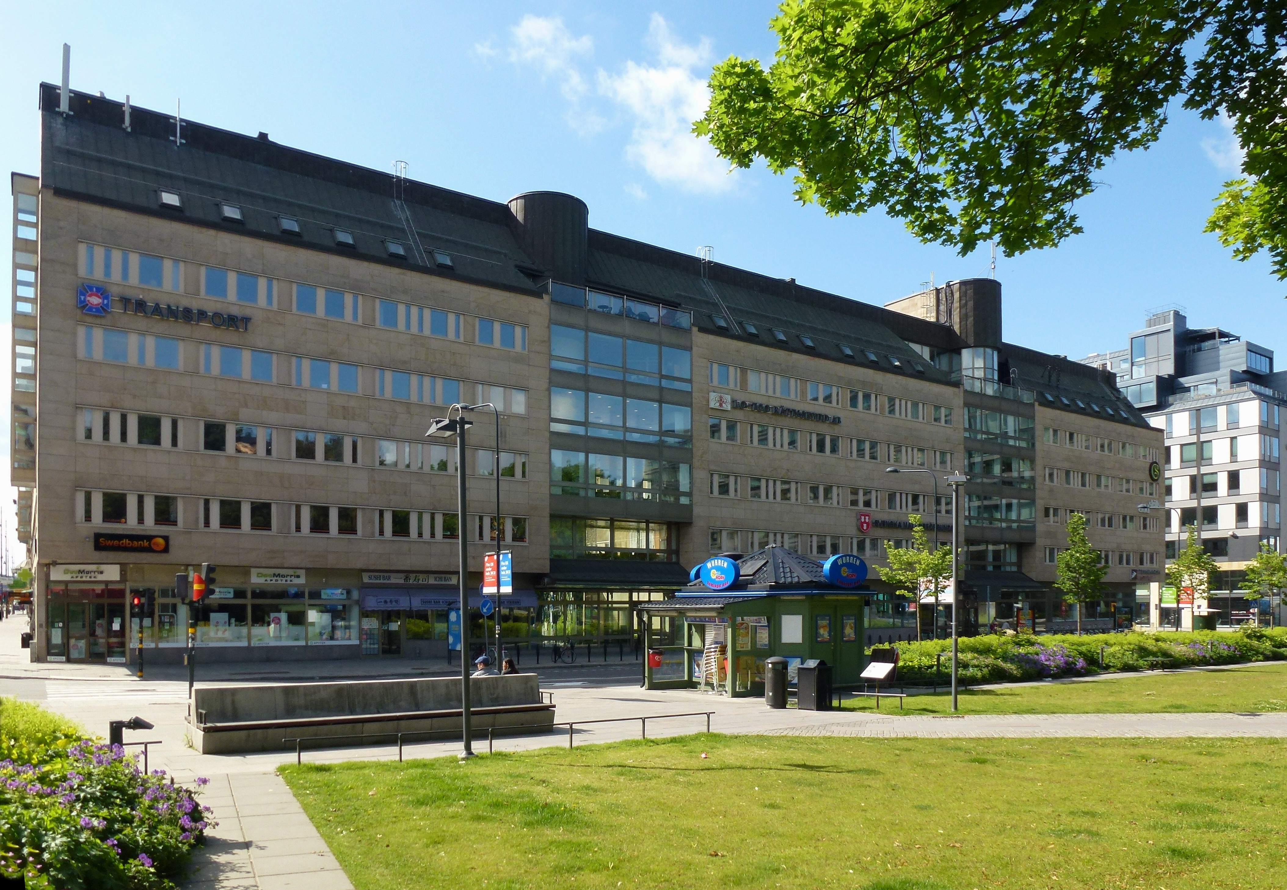 Kv Klockan Norra Bantorget, södra sidan